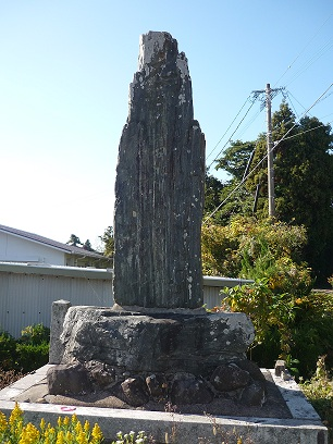 国府高等小学校跡の碑（壱岐市）